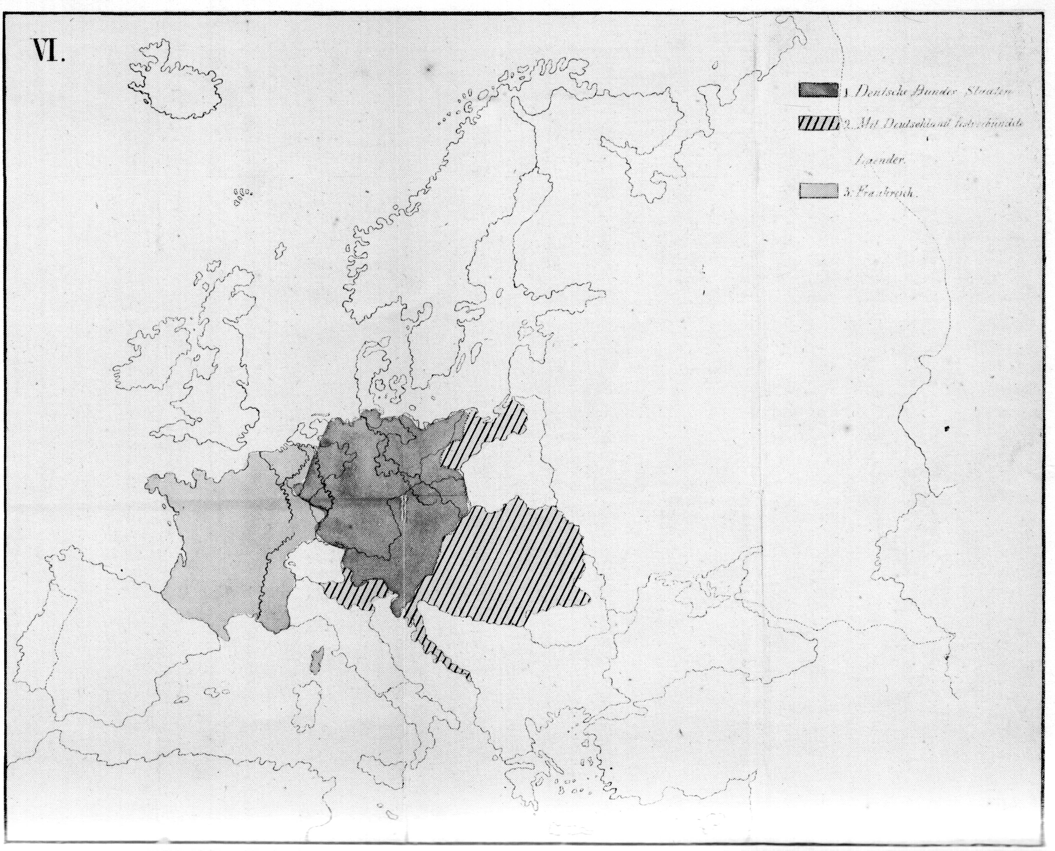 Entwurf von Oettingen-Wallerstein.